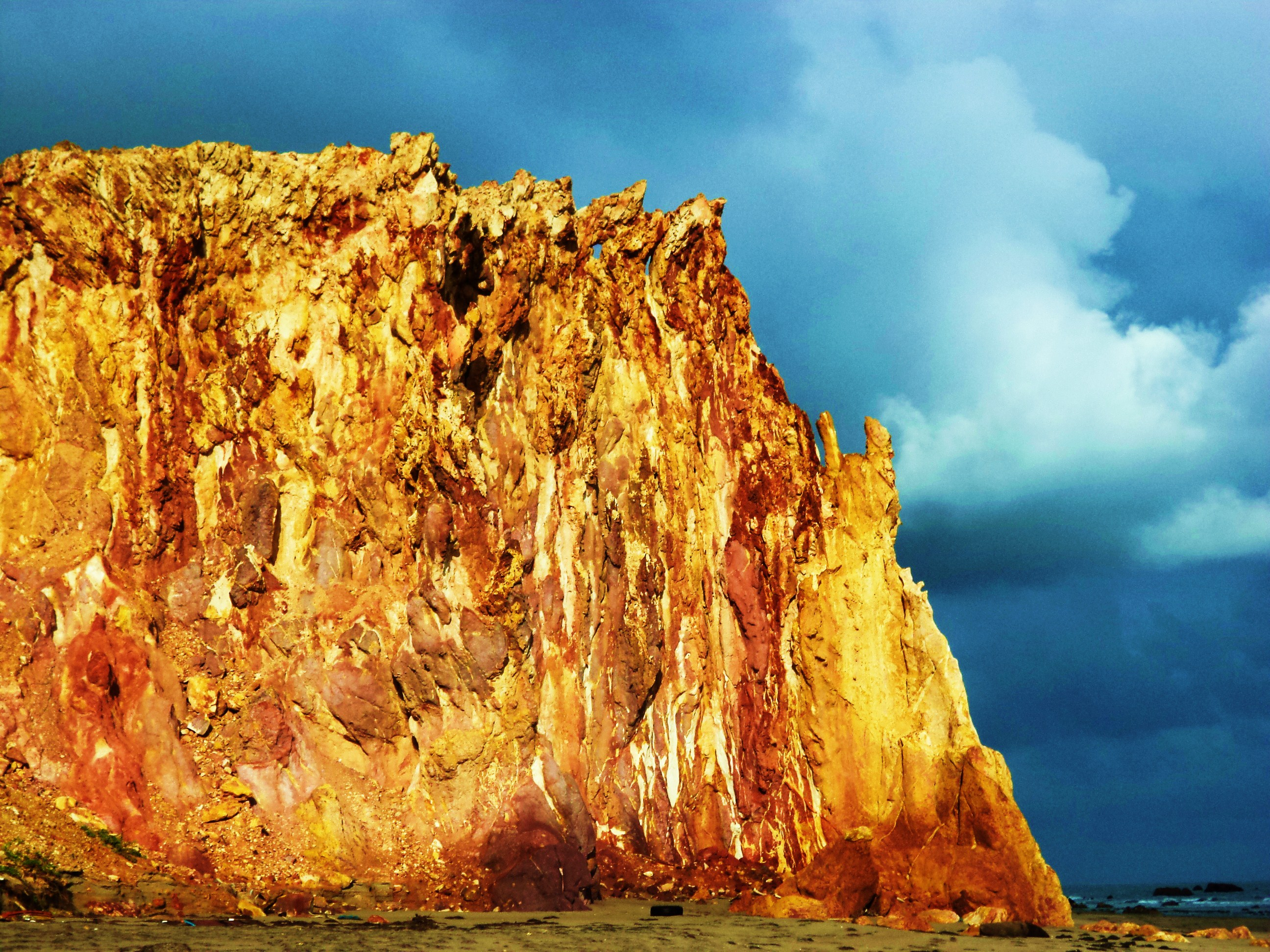 Unidade de Conservação Municipal de Icapuí, Estado do Ceará - Área de Proteção Ambiental da Praia de Ponta Grossa